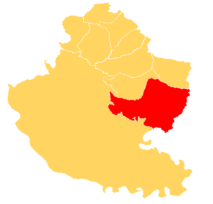 Rincón de Nogoyá se encuentra en el el este de la región Departamento Victoria. El código postal de la región es 3155.